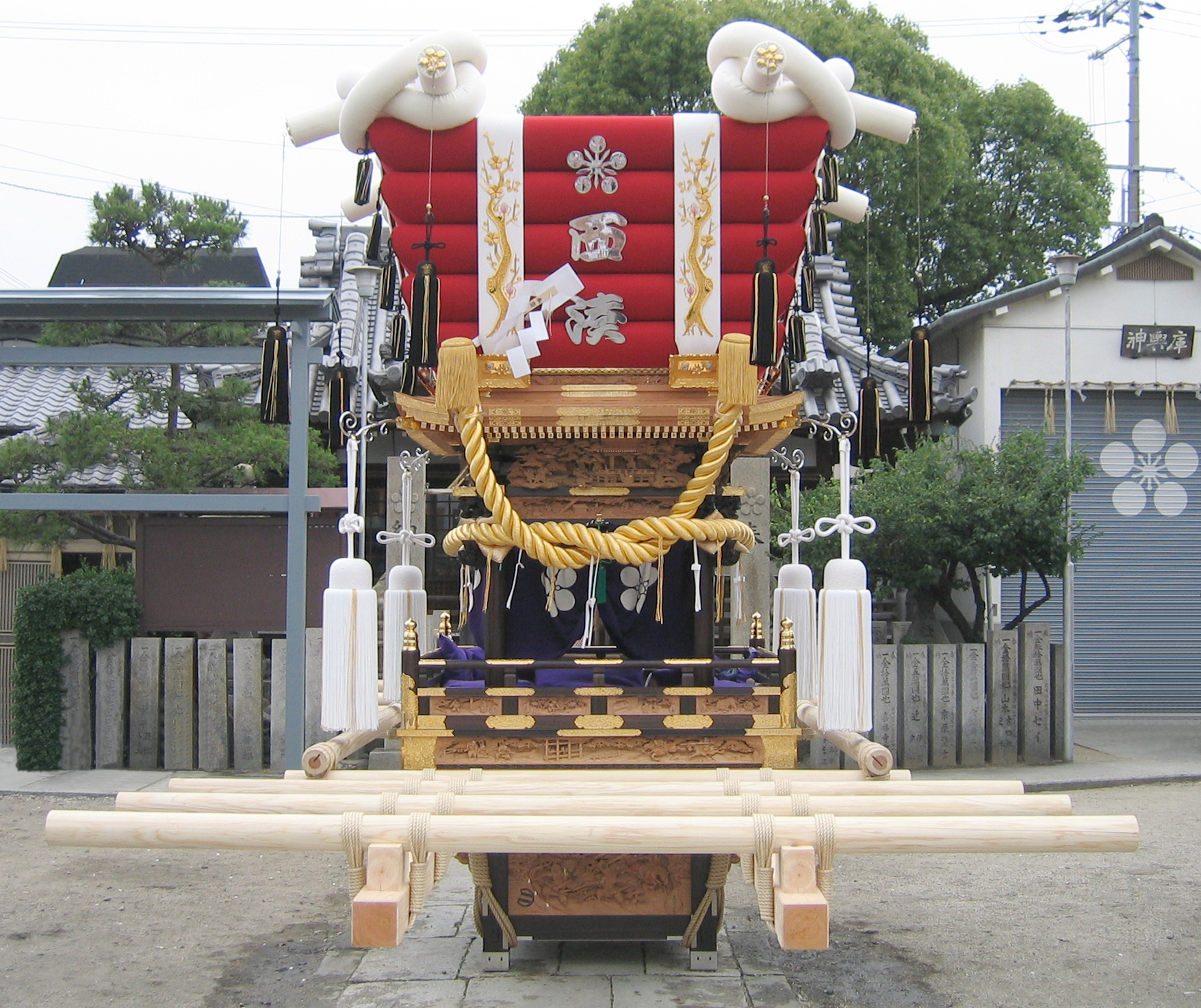 大阪 堺 西湊 堺型 ふとん太鼓 平成十六年度新調入魂式